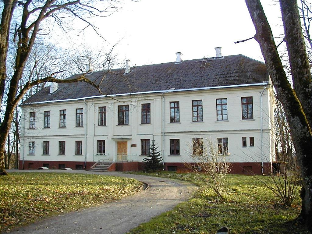 Rāvas muižas pils 2001-11-10